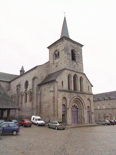 église abbatiale de Meymac - Corrèze - portail novembre 2000 photo personnelle